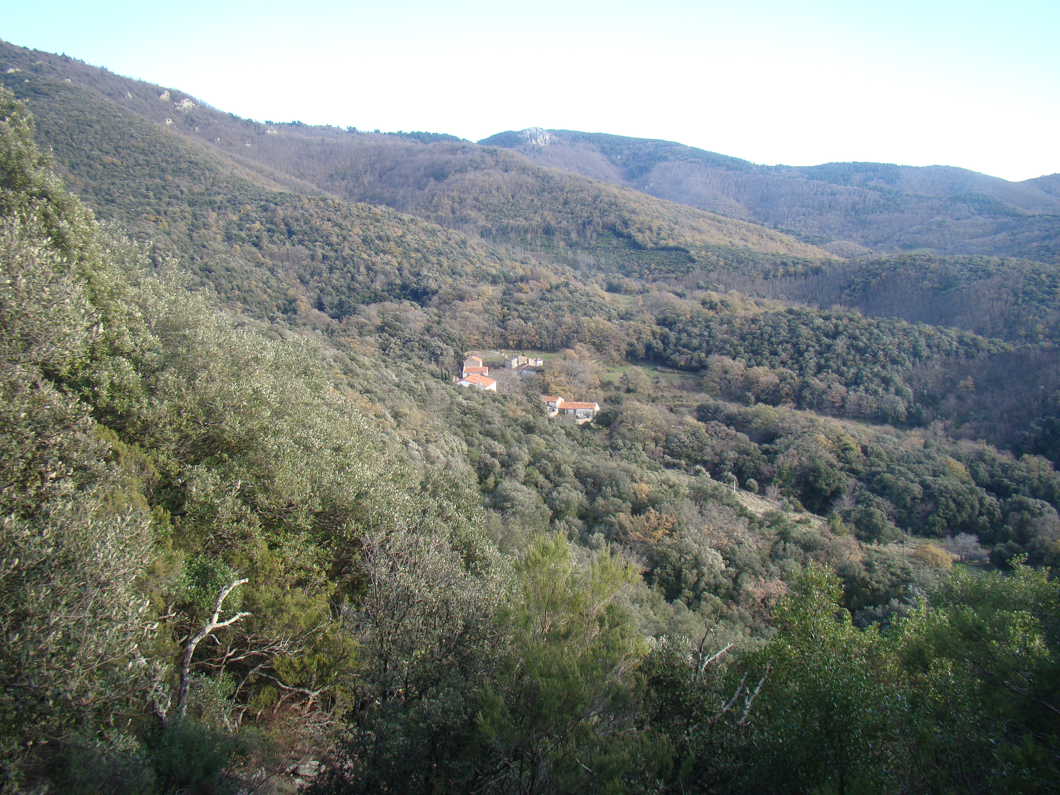 Vue du village de Saint-Jean de l'Albère depuis le sentier menant au dolmen la Balma de Na Cristiana